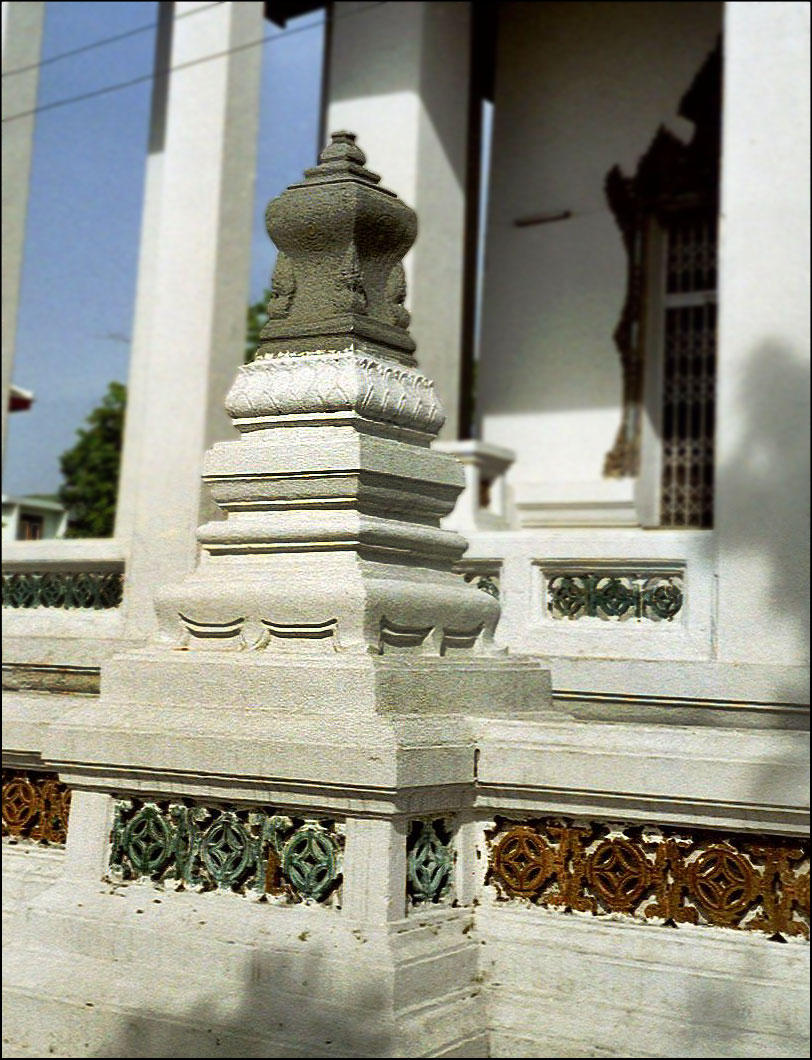 "4-sided" Bai Sema (sacred boundary stones), Wat Mahanaparam, Bangkok, own photo June 2002 (de: Bai Sema (Grenzsteine) im Wat Mahanaparam, Bangkok) Bai_sema_3.jpg